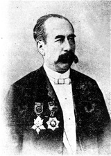 Выдающийся армянский композитор Тигран Чухаджян